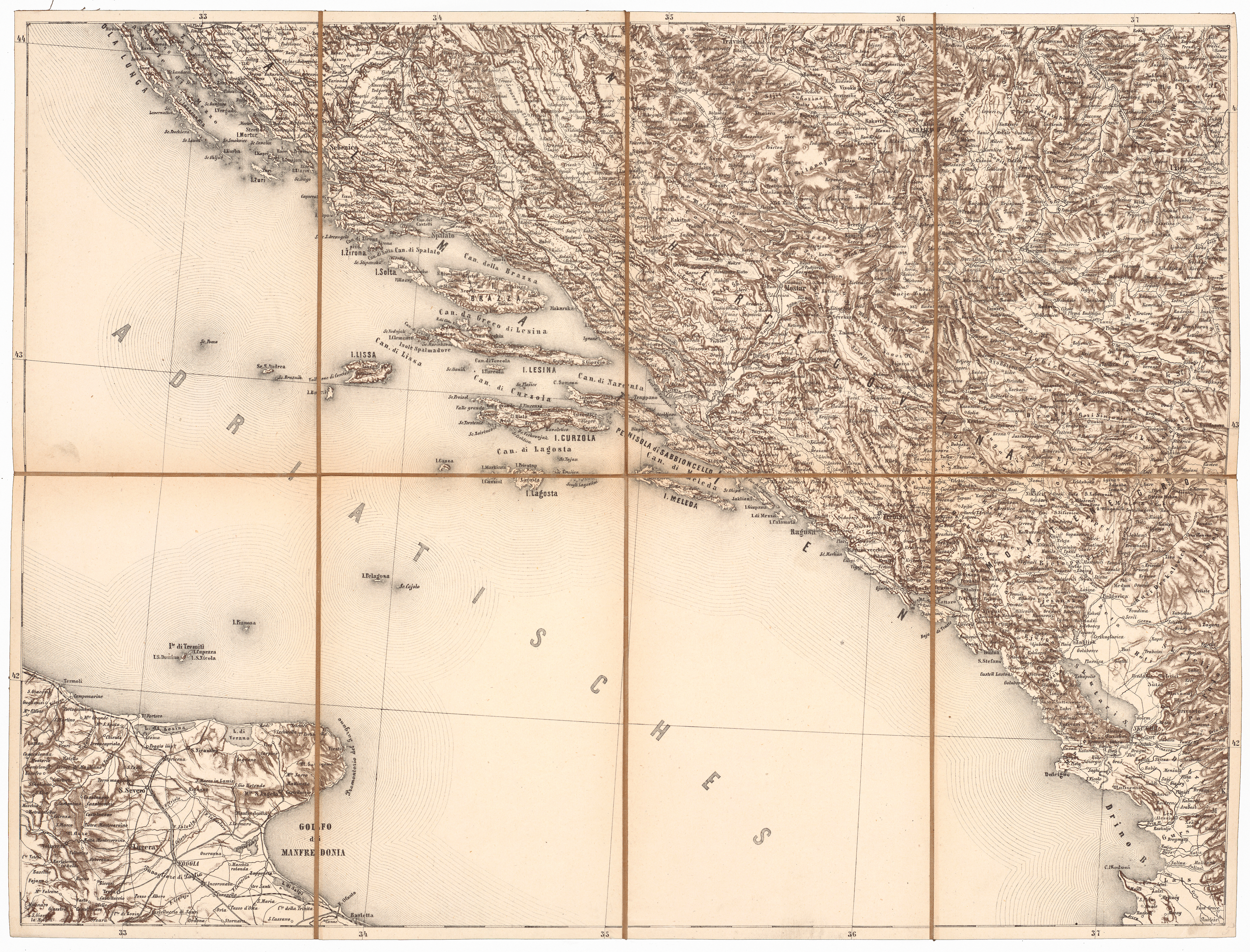 südliches Dalmatien, Bosnien und nördliches Albanien aus der Generalkarte der europäischen Türkei und Griechenlands